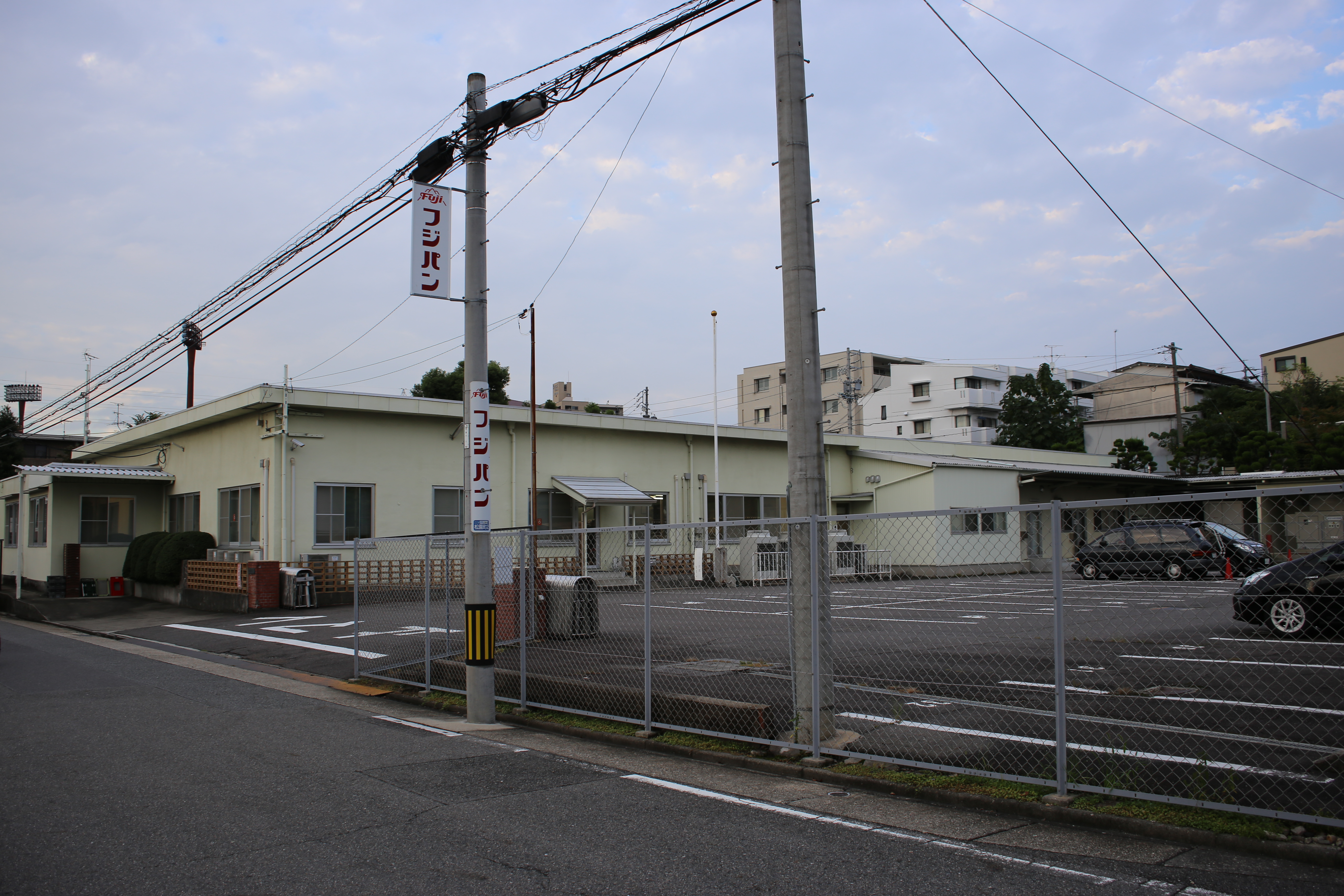 名古屋市瑞穂区松園町のフジパン本社を西側公道南側より撮影